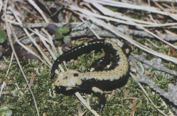 Salamandra atra subsp. aurorae